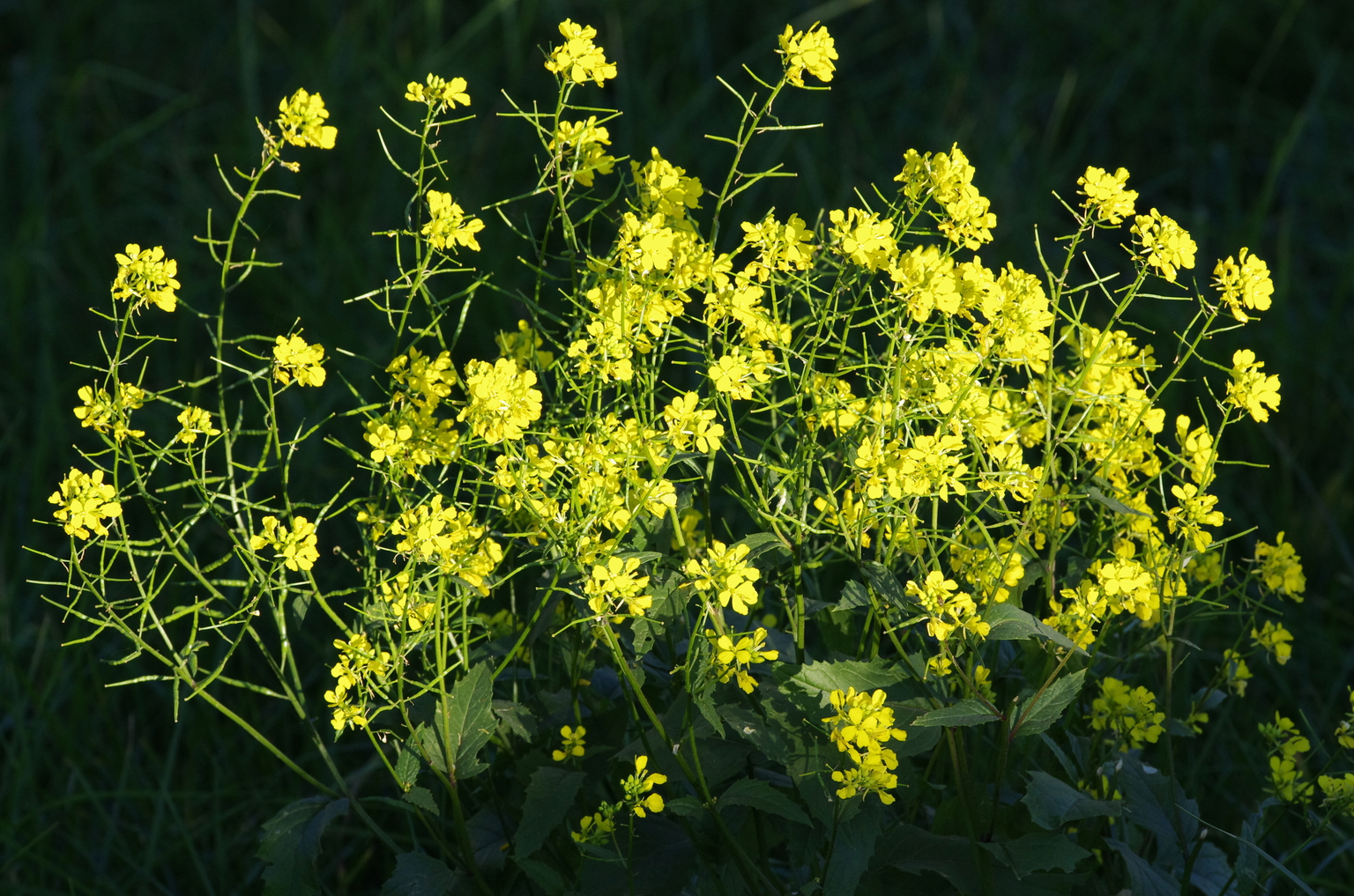 Sinapis arvensis (Ackersenf); Fundort: Rheinauen Düsseldorf-Lörick, ca. 30 msm